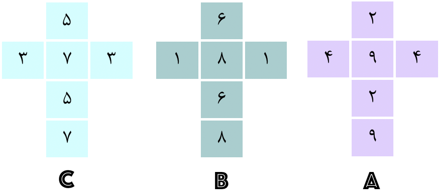 این عکس سه تاس ناگذرا را نشان می‌دهد.